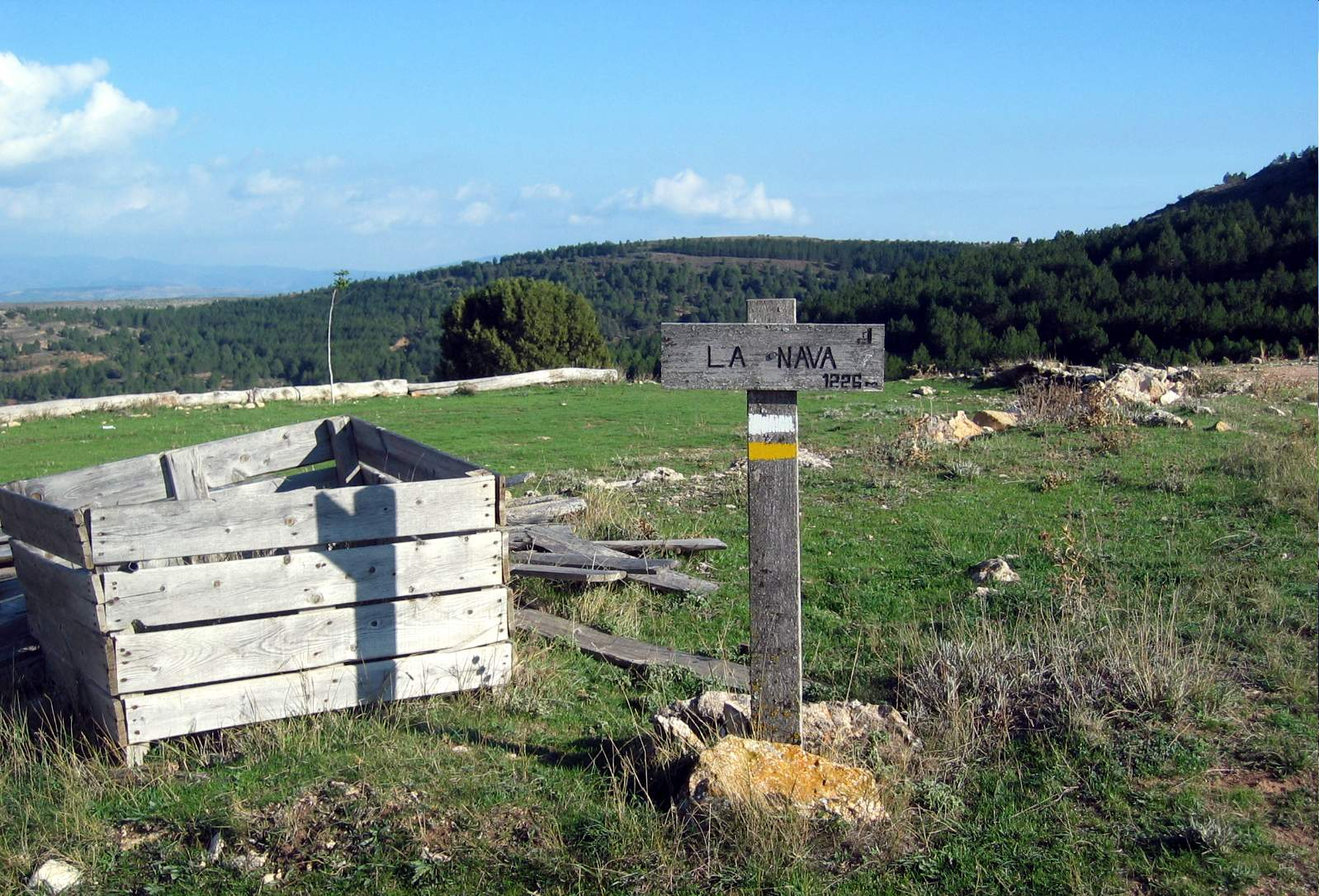 Paisaje de La Nava, Castielfabib (Valencia), con detalle del cartel indicador del lugar y altitud.